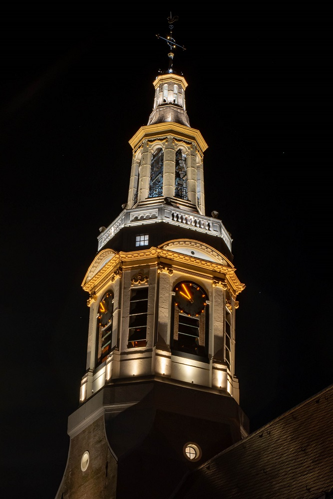 De toren van Nijkerk met de in december 2019 in werking gestelde LED-verlichting